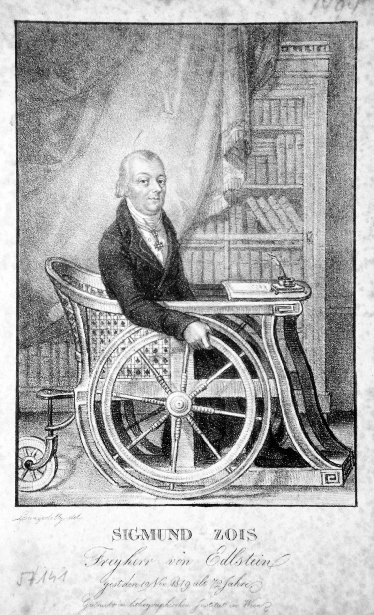 Sigmund Zois, Freiherr von Edelstein,; Lithographie von Josef Lanzedelly d. Ä. um 1820